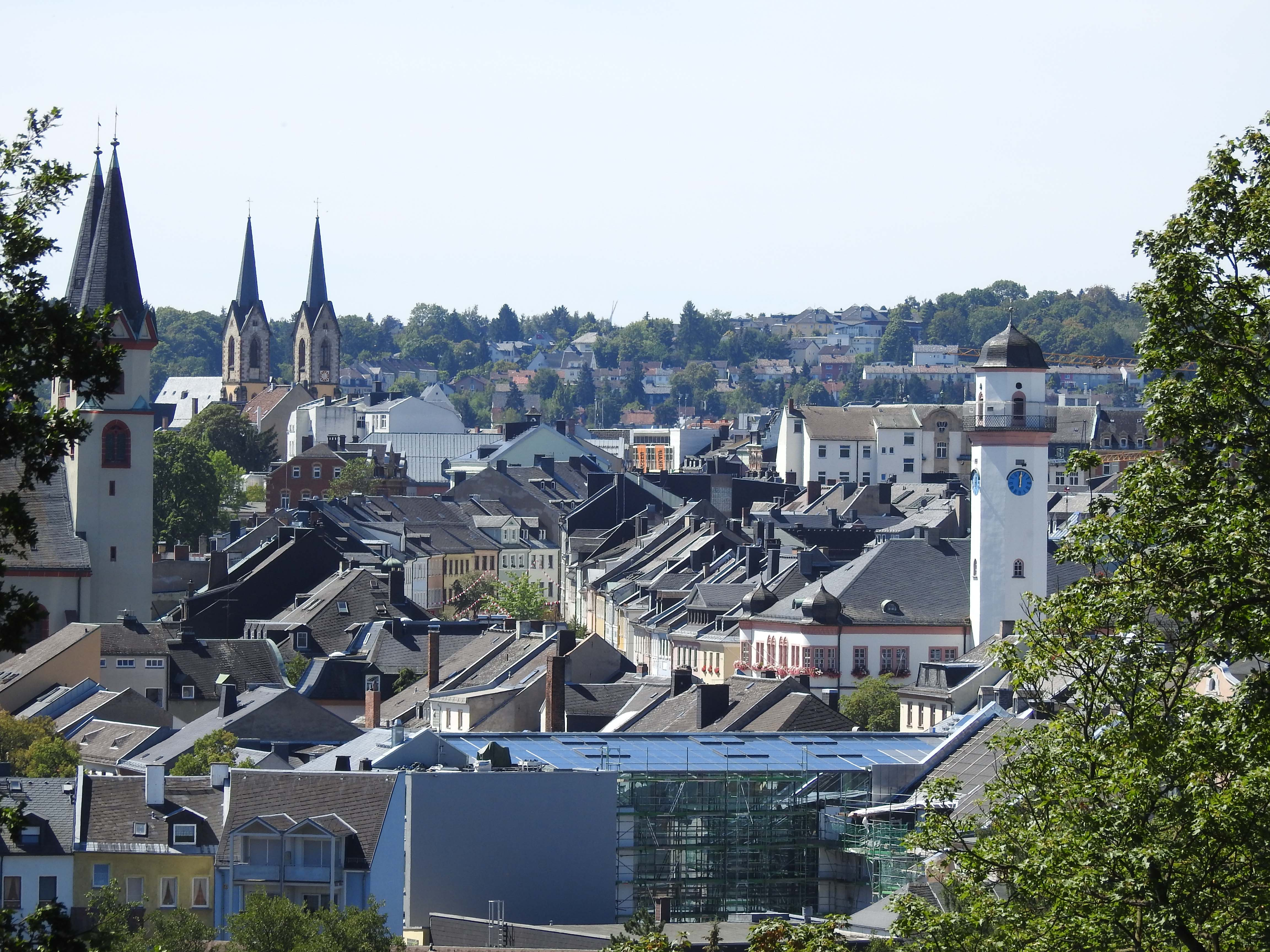 Blick vom Theresienstadt auf Untere Vorstadt und Altstadt Hof (Saale)